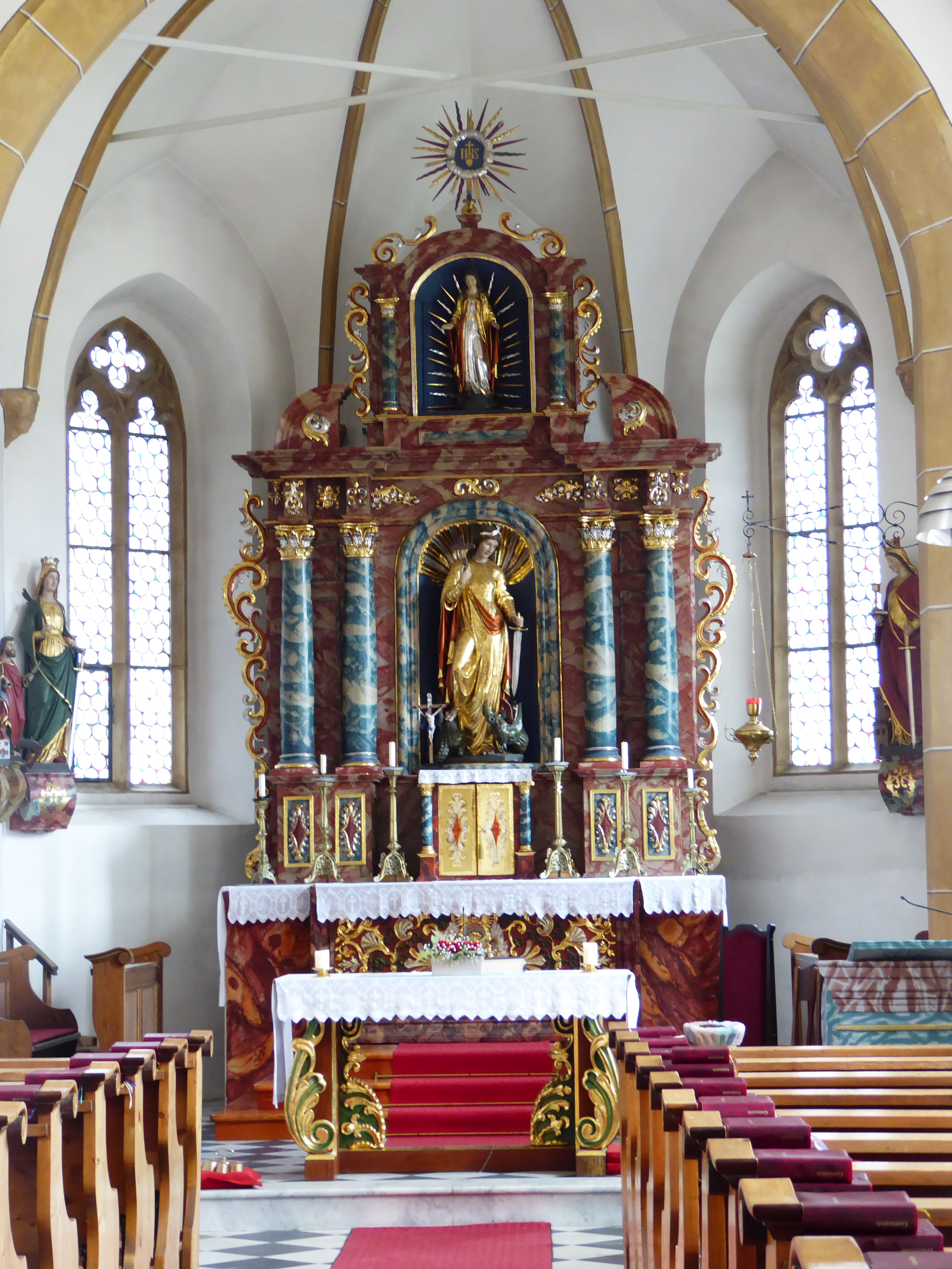 Pfarrkirche hl. Margarta, Gottestal, Wernberg, Kärnten - Hochaltar (aus St. Wolfgang in Grades, Statuen hl. Margareta, Madonna, Katharina und Barbara vom ehem. Hochalter (Franz Oblak, 1875) (Aufnahme durch Glas)